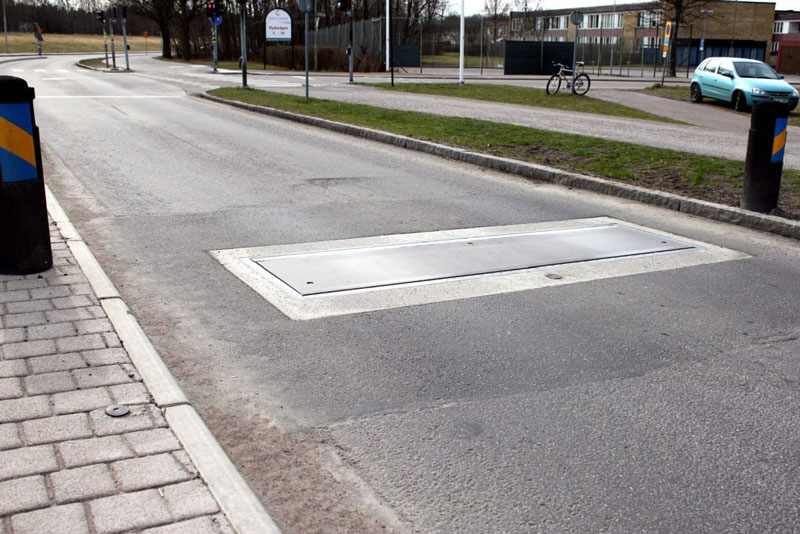 Actibump ve vozovce